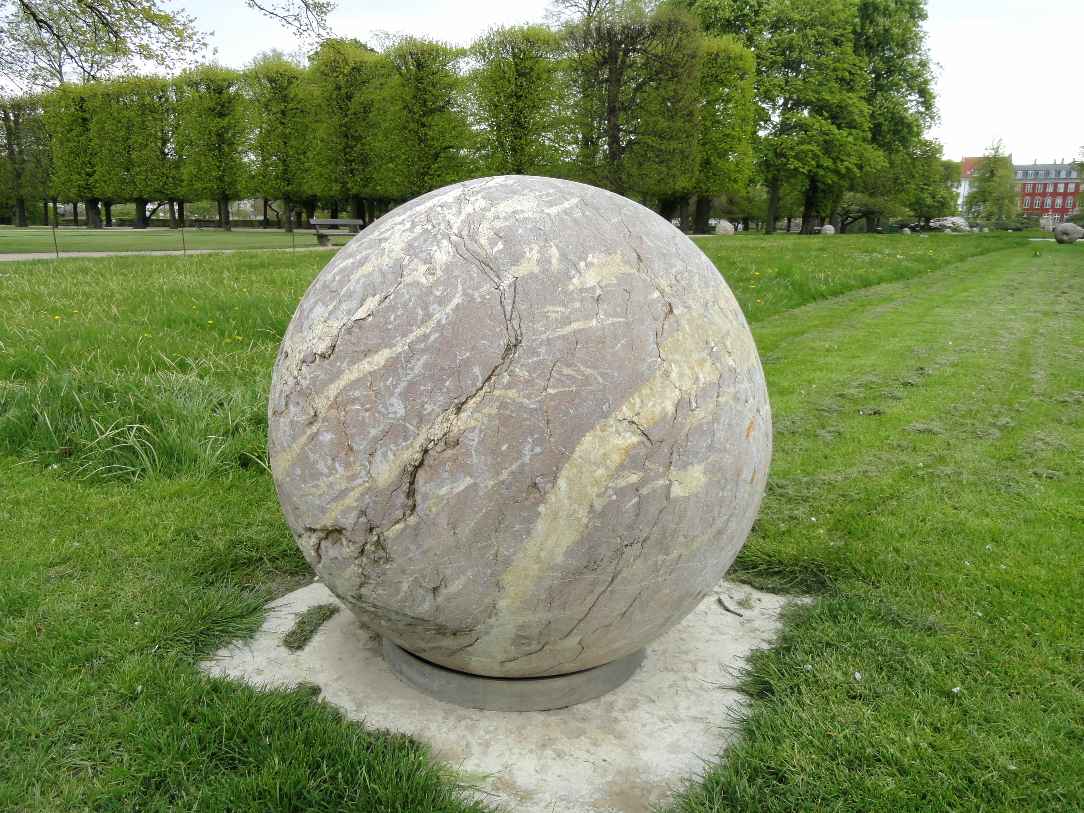 Kongens Have, Copenhagen, Denmark.